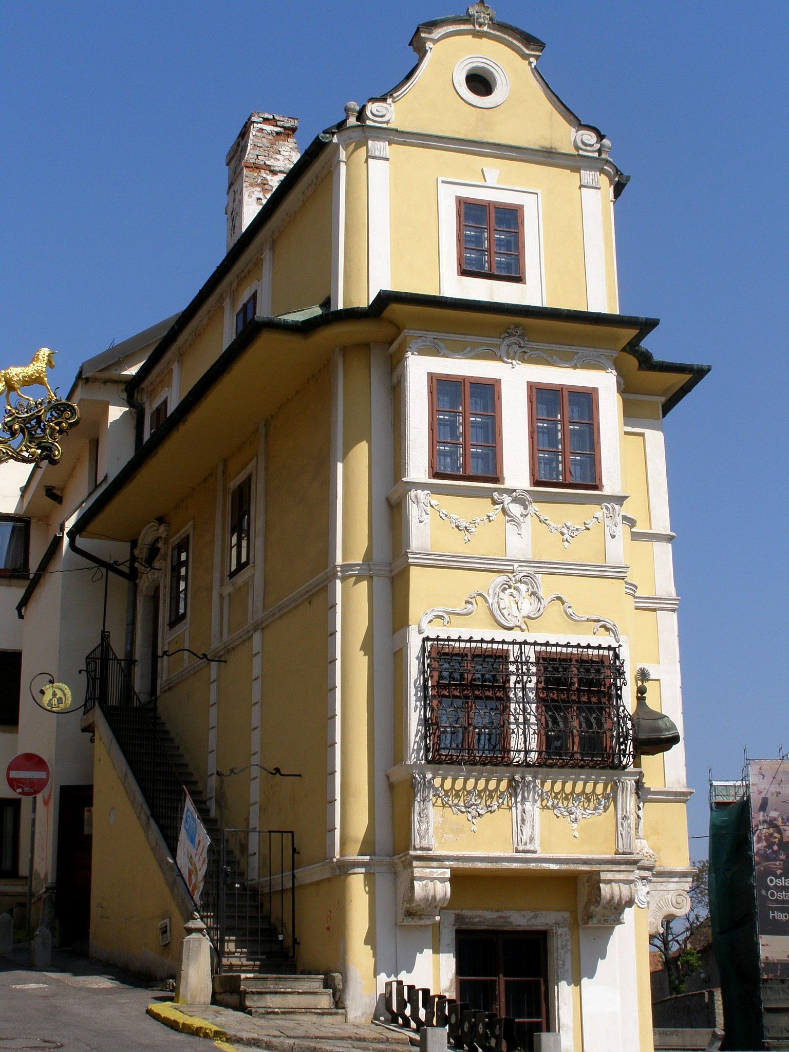 Celkový pohľad na dom